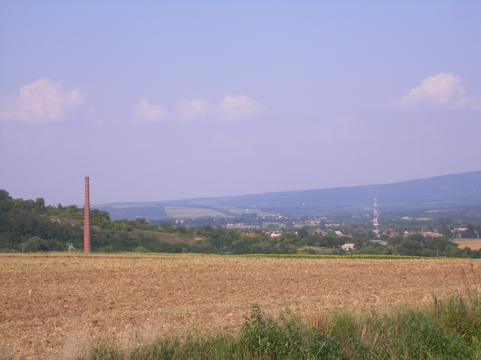 Ipolypásztó - látkép nyugat felől